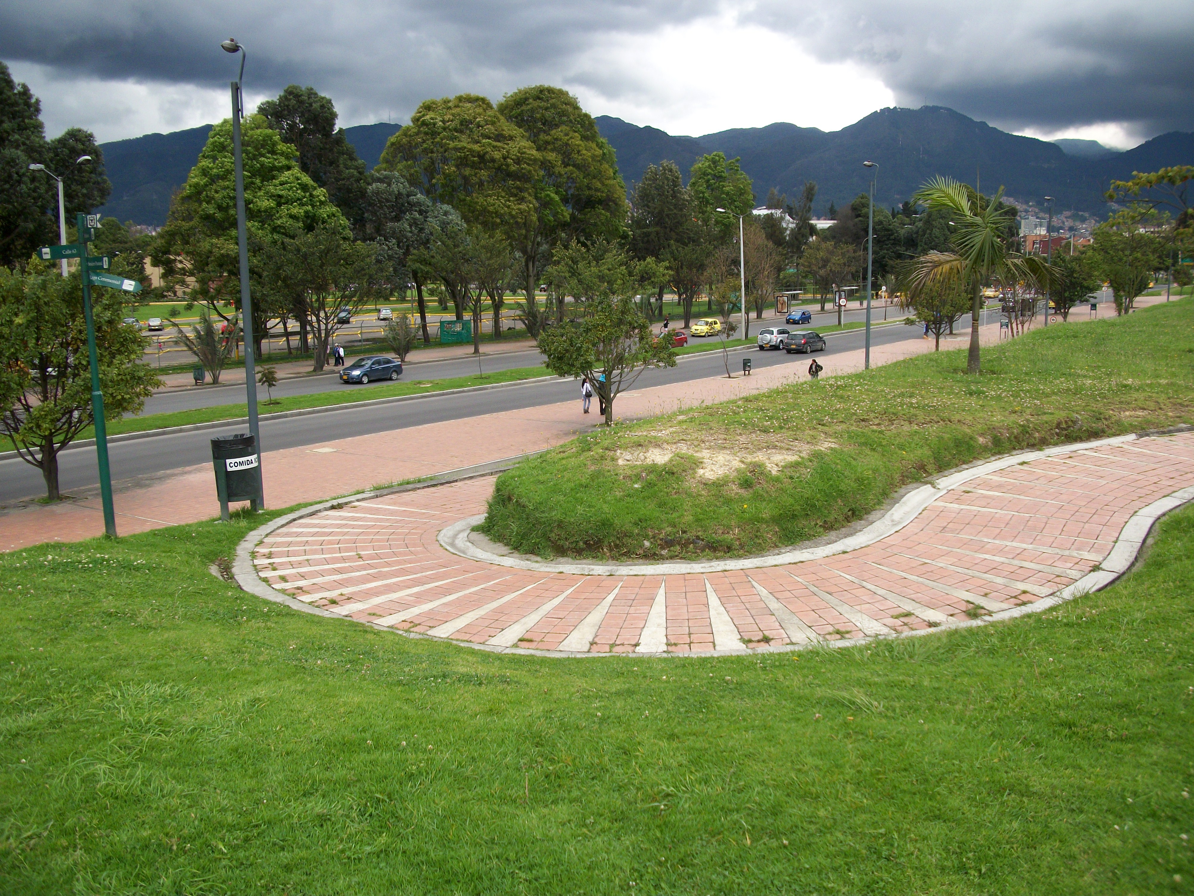 Acceso a la Biblioteca Pública Virgilio Barco por la calle 57. Bogotá.